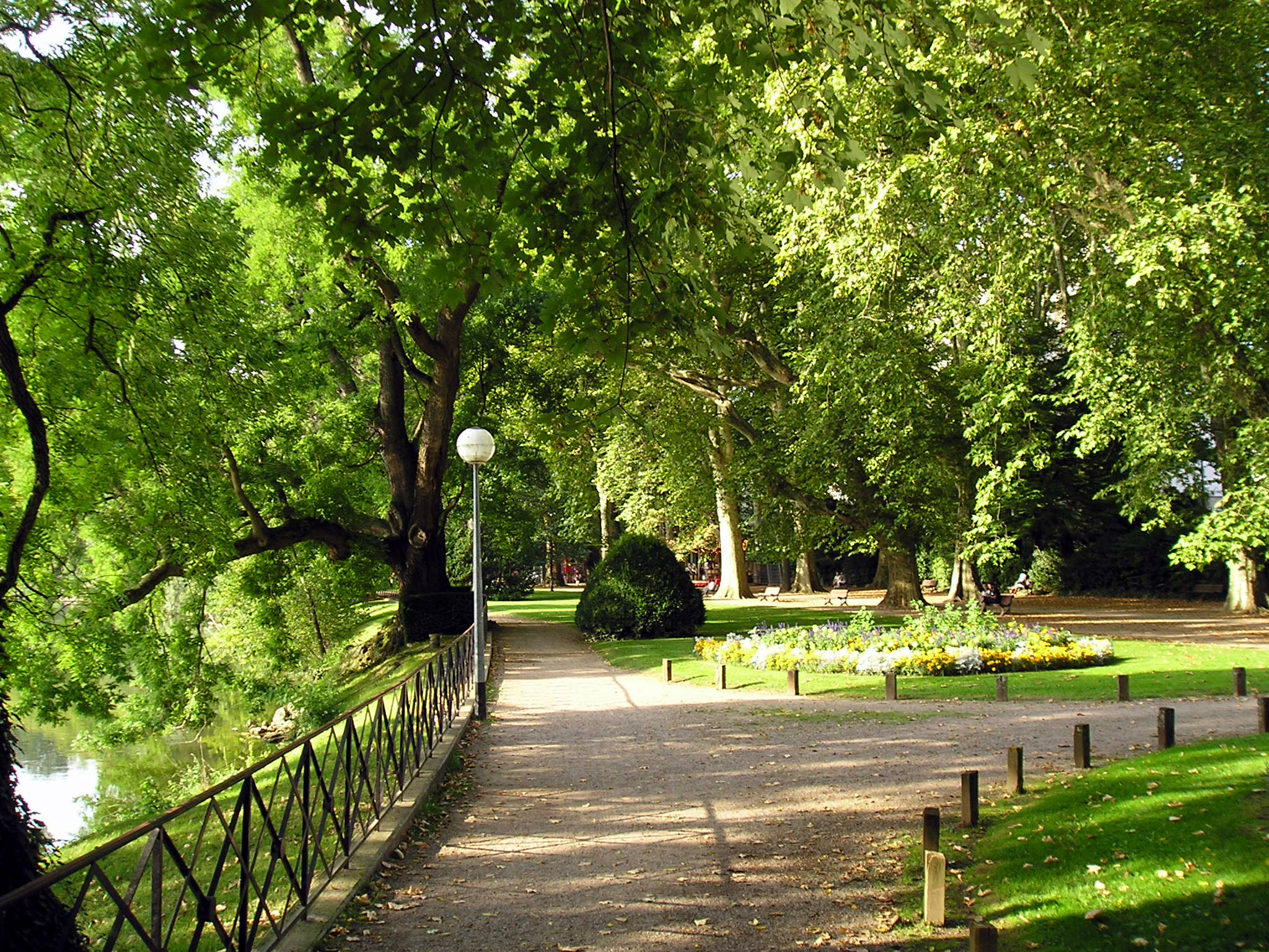 Promenade Micaud de Besançon